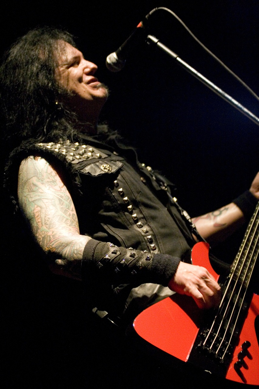 David Vincent of Morbid Angel Live @ Santana Hall - 08/03/2009 - São Paulo, Brasil É proibida a cópia ou reprodução deste material sem a autorização do autor. Por favor, não publique nada daqui sem o devido crédito. Fotógrafo: Alexandre Cardoso